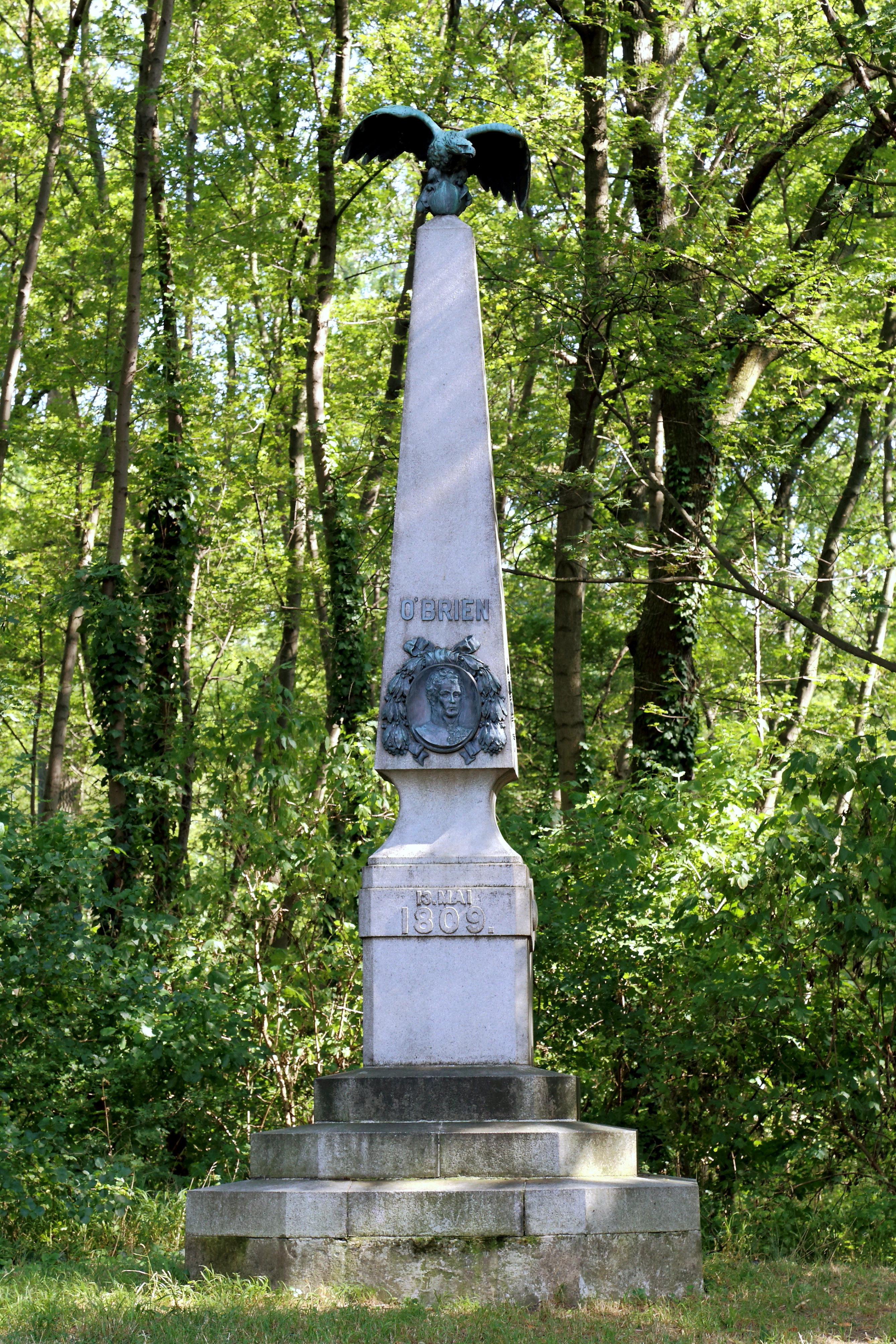 Das O'Brien-Denkmal am nördlichen Rand des Auparks in Jedlesee, ein Ortsteil des 21. Wiener Gemeindebezirks Floridsdorf.Anlässlich der Jahrhundertfeier der Franzosenkämpfe in der Schwarzlackenau wurde das Denkmal in Auftrag gegeben und am 17. Juni 1909 enthüllt.